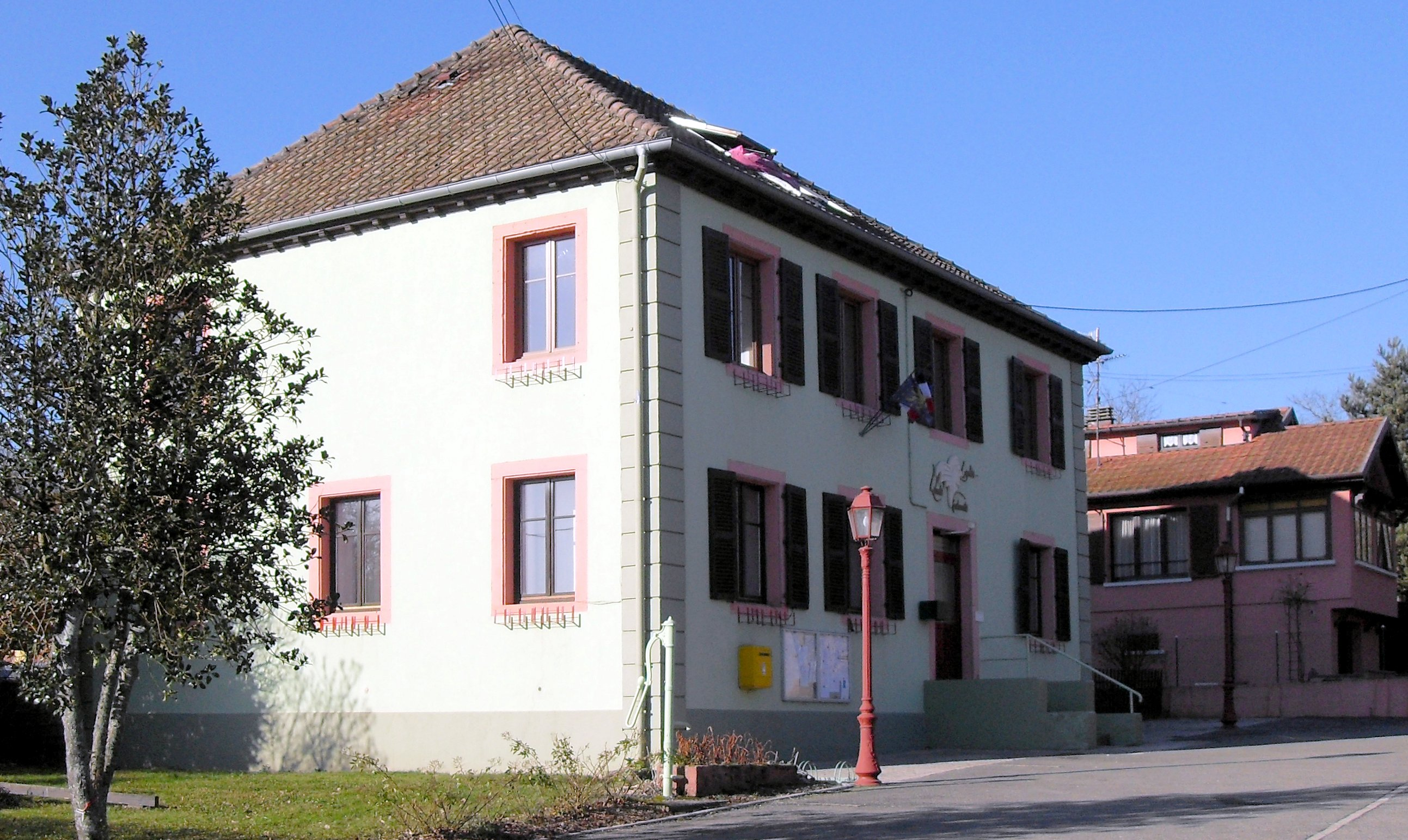 La mairie de Saint-Germain-le-Châtelet